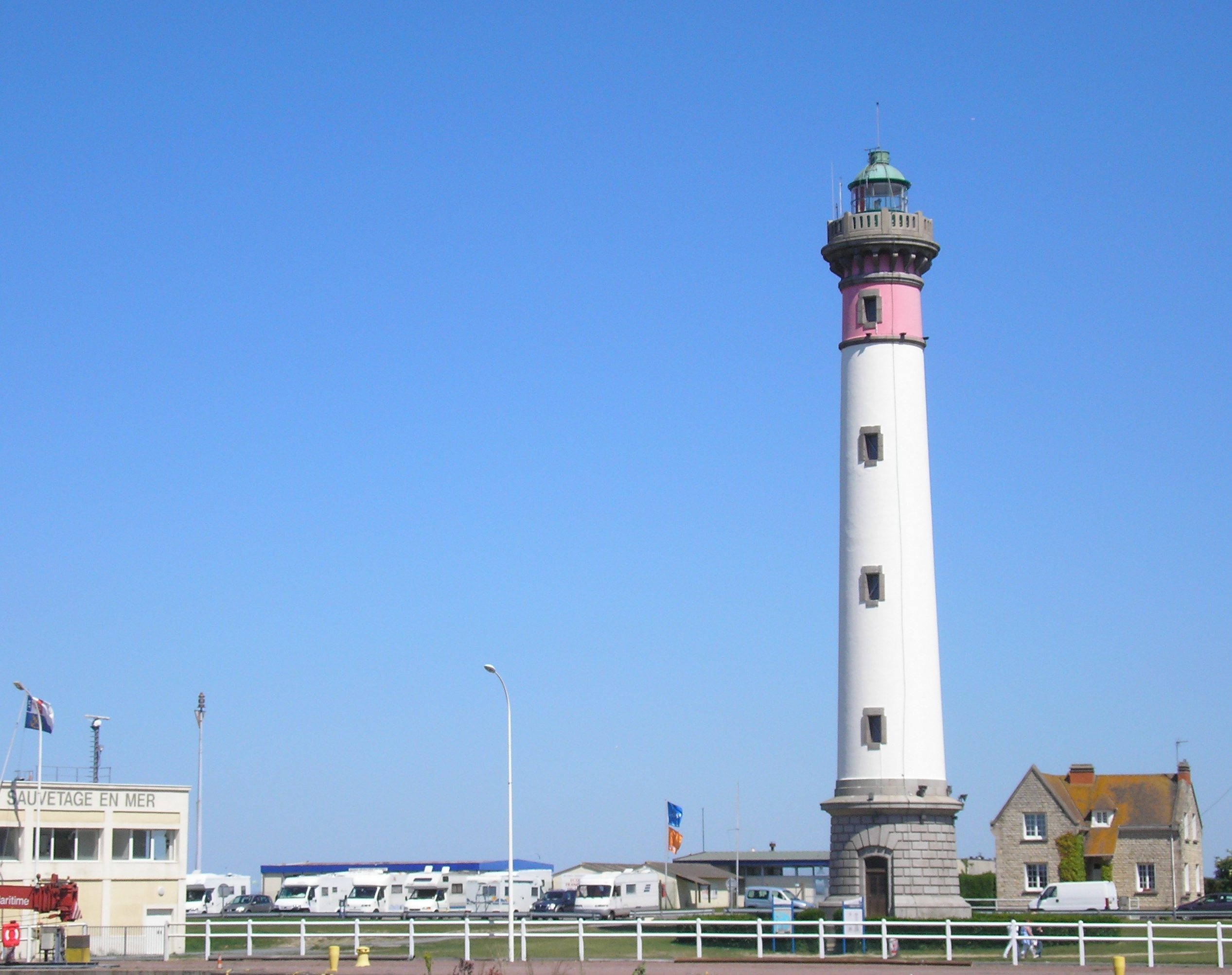 Ouistreham (Normandie, France). Le phare.